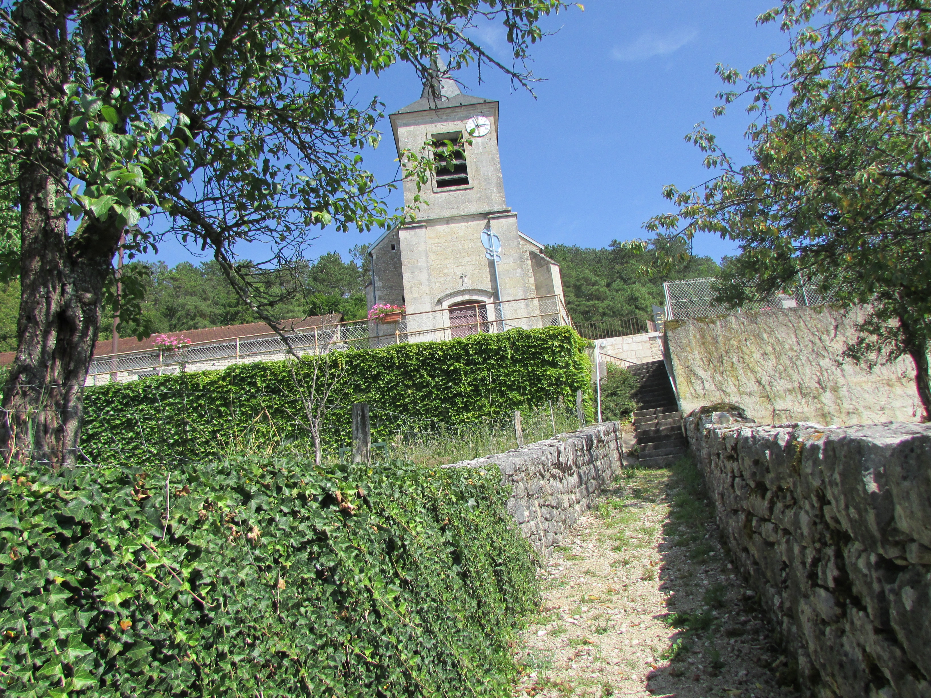 L'église.